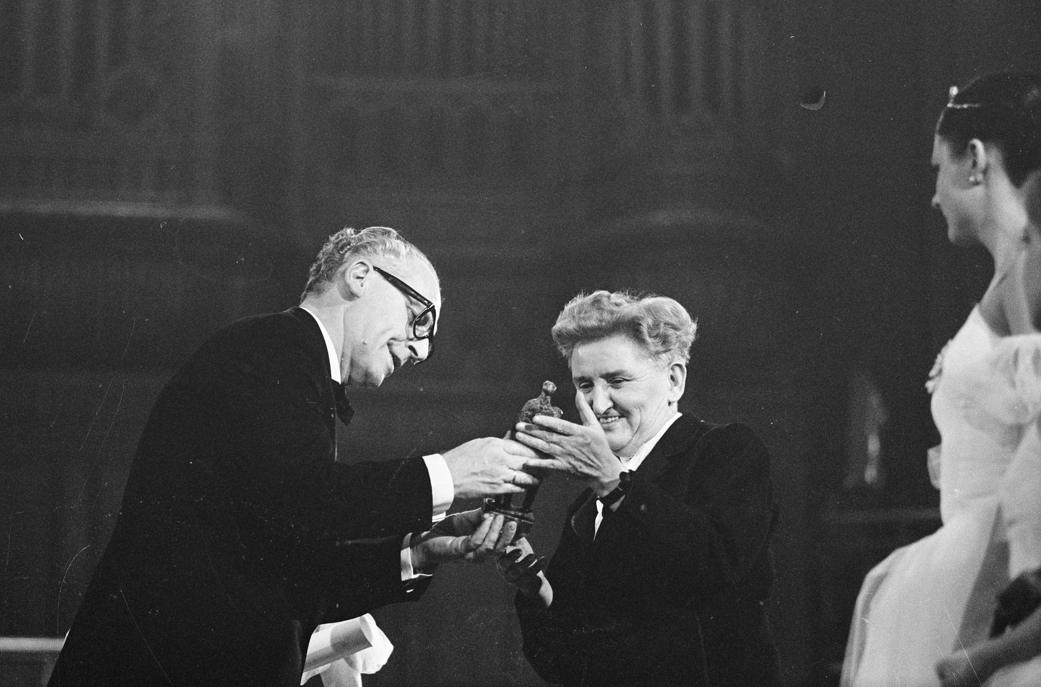 Collectie / Archief : Fotocollectie Anefo Reportage / Serie : Grand Gala du Disque klassiek 1966 in het Amsterdamse Concertgebouw Beschrijving : De Hongaarse musicienne Ilona Andor ontvangt uit handen van de minister van Cultuur Recreatie en Maatschappelijk Werk, Maarten Vrolijk (PvdA), een Edison Datum : 28 oktober 1966 Locatie : Amsterdam, Noord-Holland Trefwoorden : ministers, musici, muziekprijzen, prijsuitreikingen Persoonsnaam : Andor, Ilona, Vrolijk, Maarten Instellingsnaam : Edison Fotograaf : Ron Kroon / Anefo Auteursrechthebbende : Nationaal Archief Materiaalsoort : Negatief (zwart/wit) Nummer archiefinventaris : bekijk toegang 2.24.01.05 Bestanddeelnummer : 919-7327